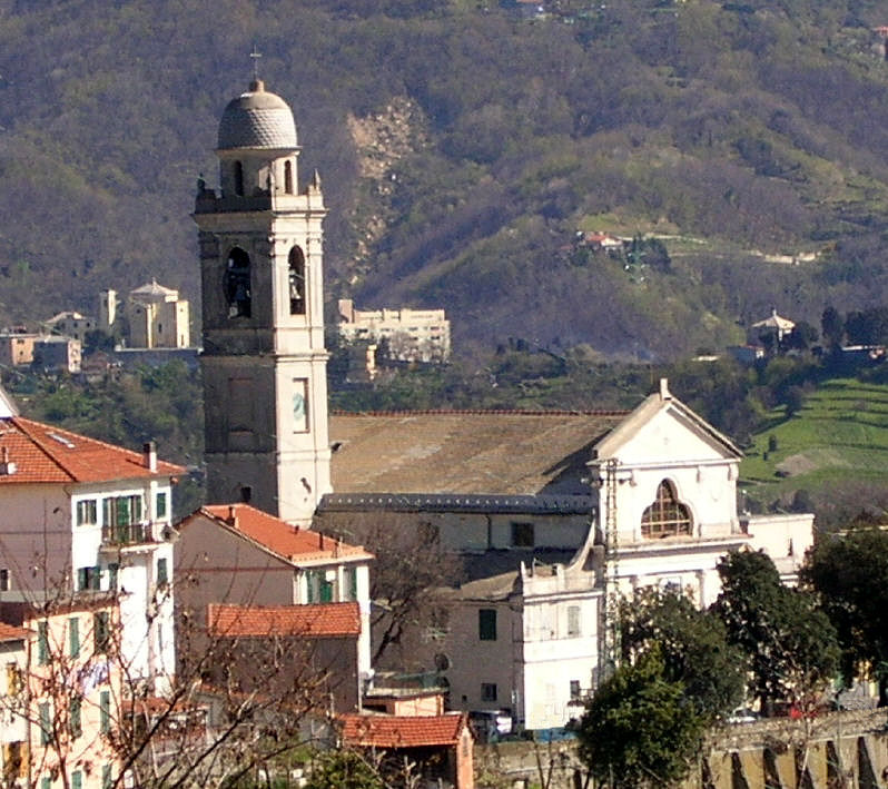 Foto propria Chiesa s. Martino di Murta (Genova)